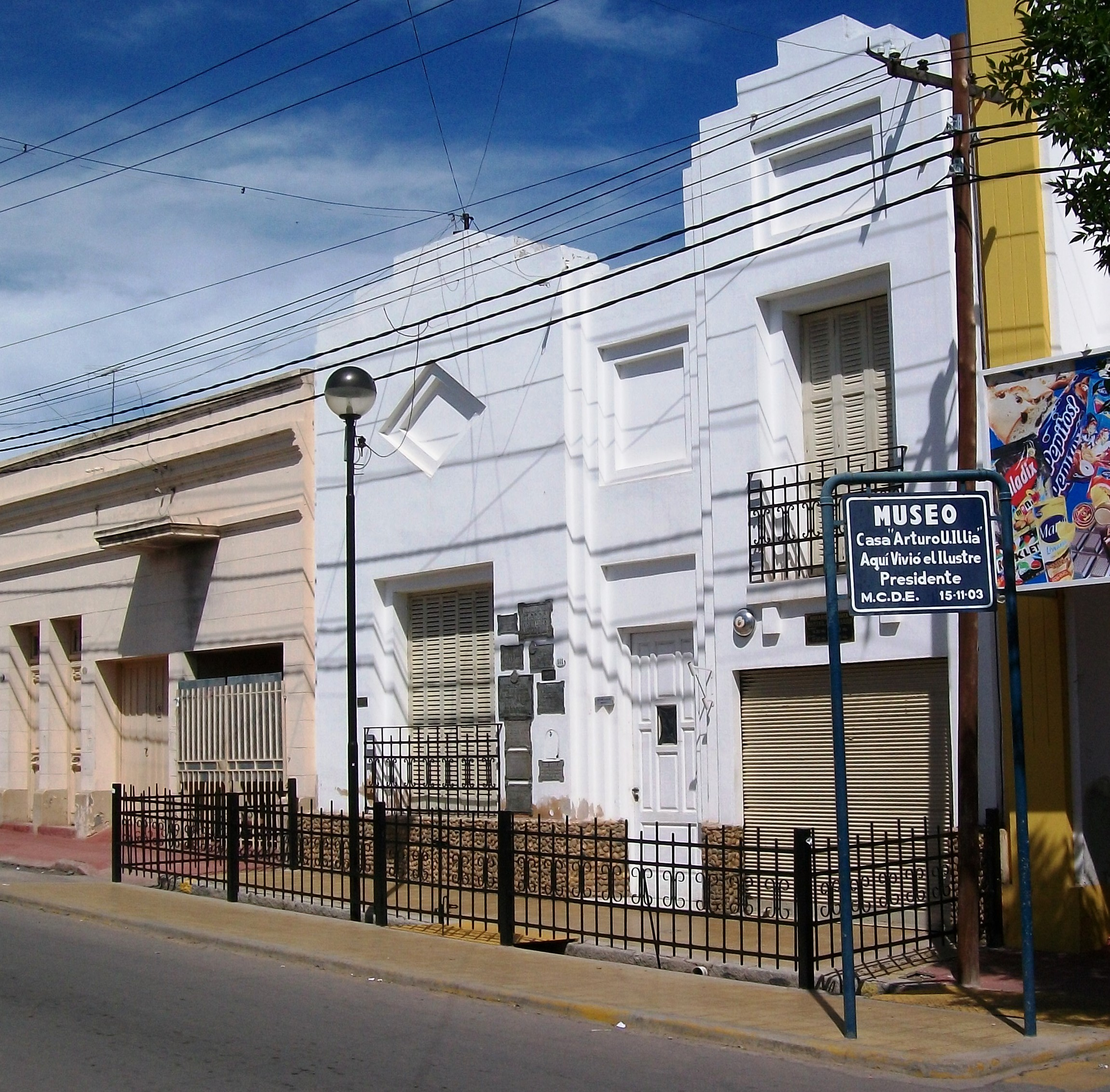 Casa donde vivió el Presidente Arturo U. Illia en Avellaneda 181, Cruz del Eje, Prov. de Córdoba, Argentina.